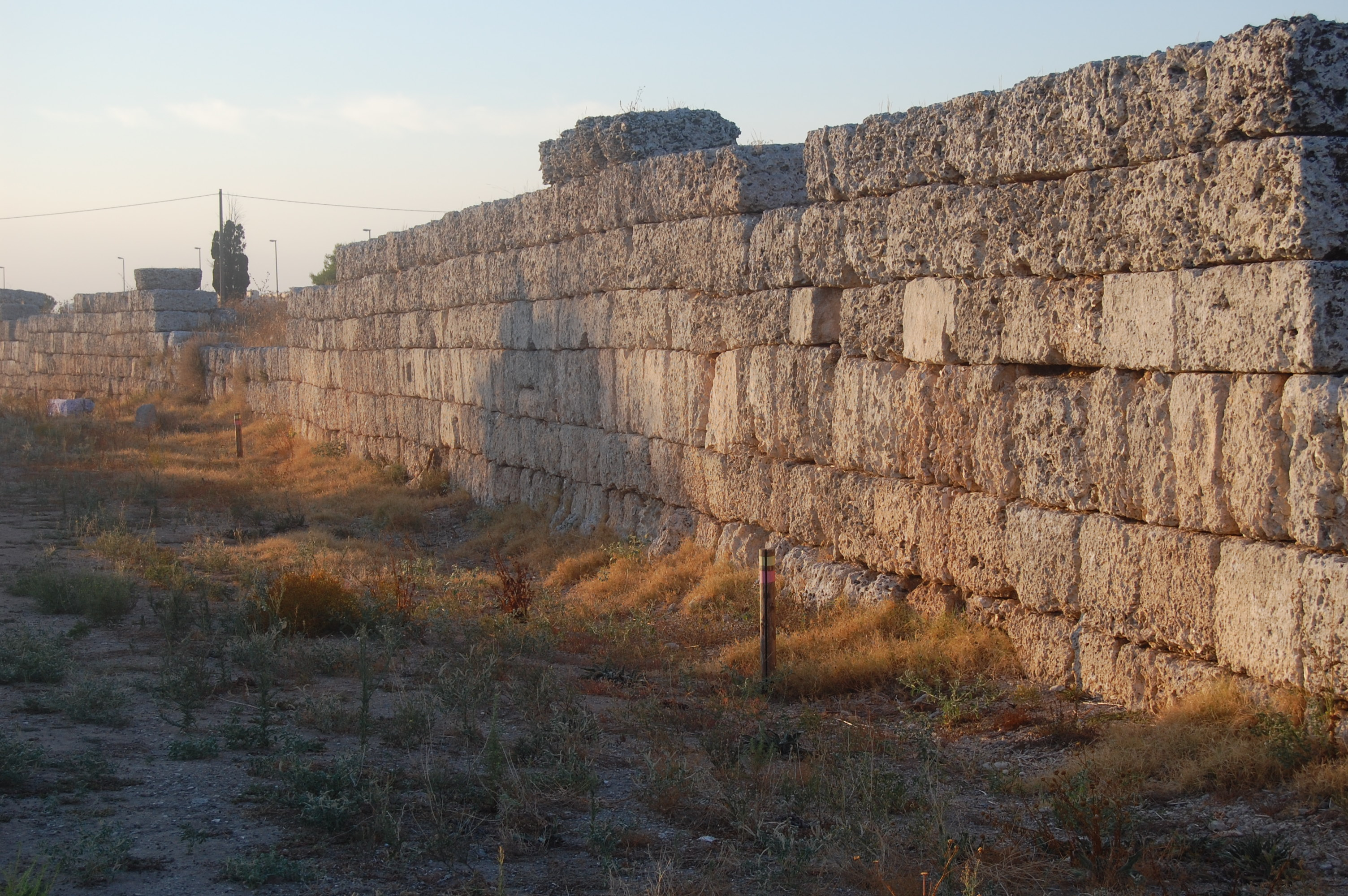 Mura messapiche di Manduria (TA - Italy). Cinta esterna